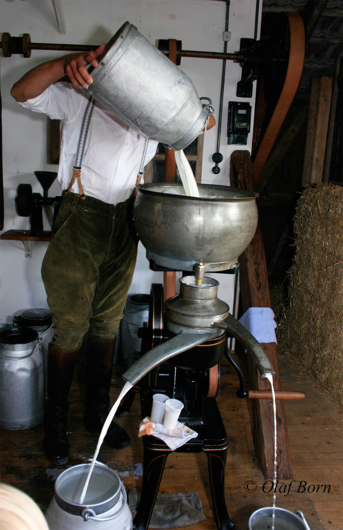 Befüllen einer Milchzentrifuge